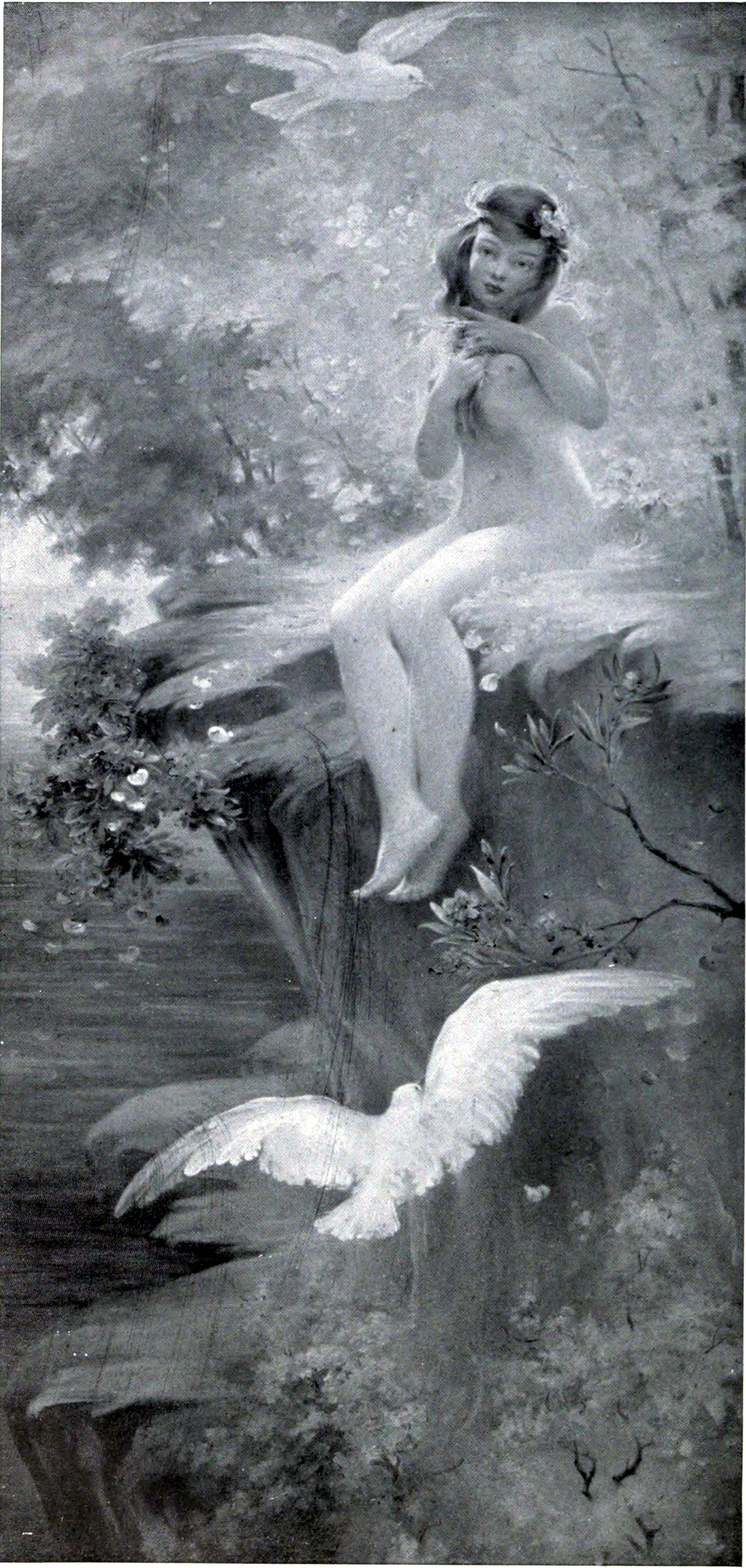 Printemps